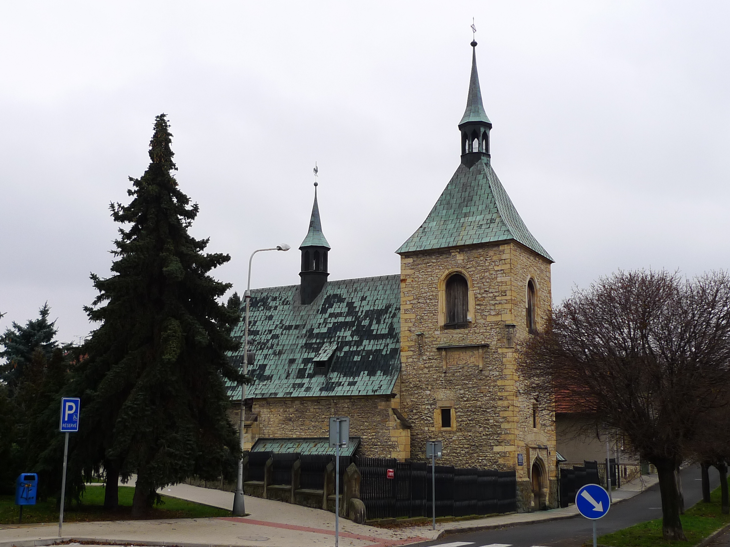 Kostel Matky Boží (Louny), Louny